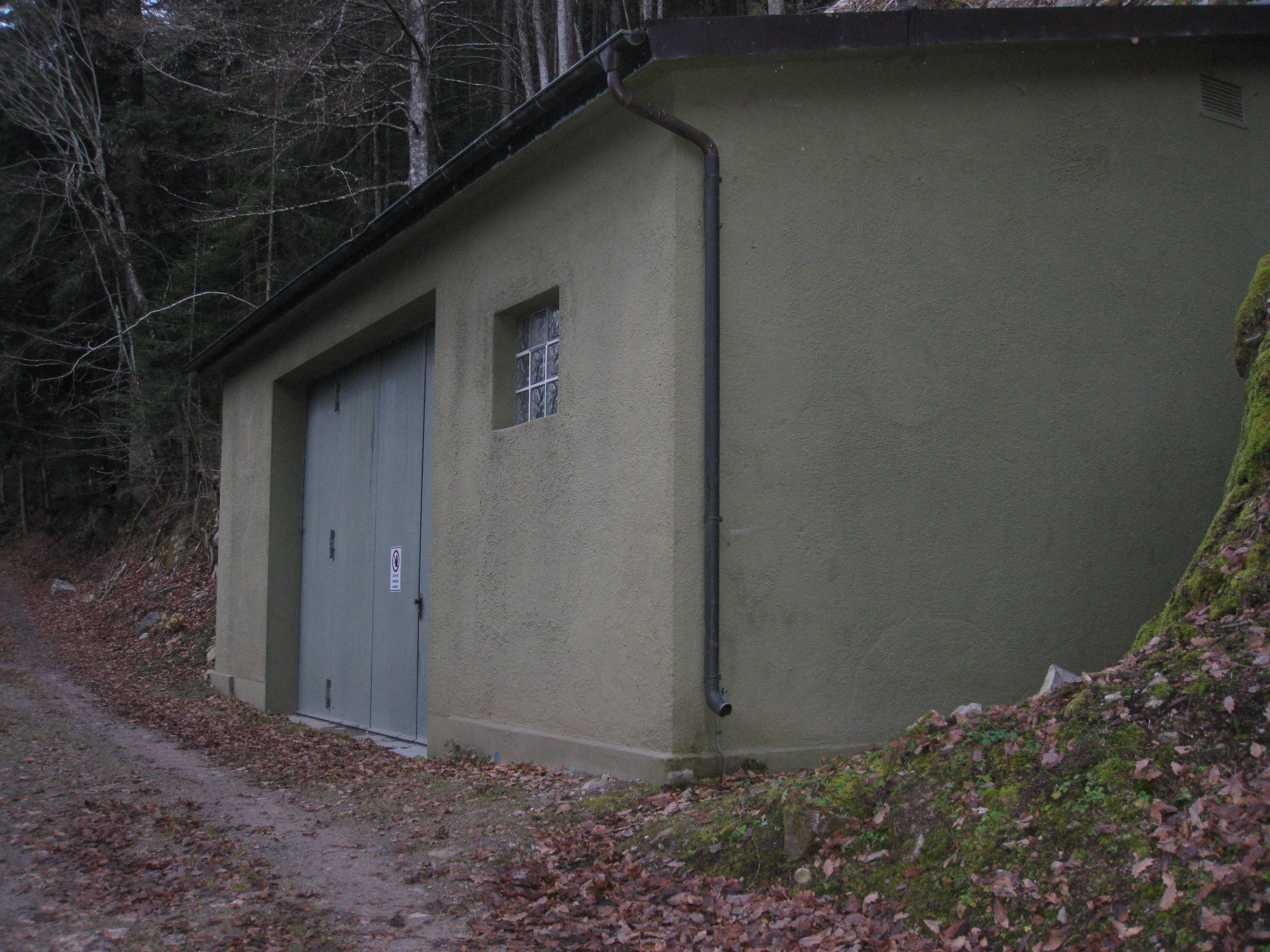 Ehemaliges Schieberhaus des früheren Kraftwerks Eichholz